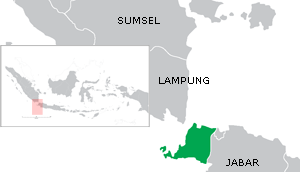 Banten province, Indonesia